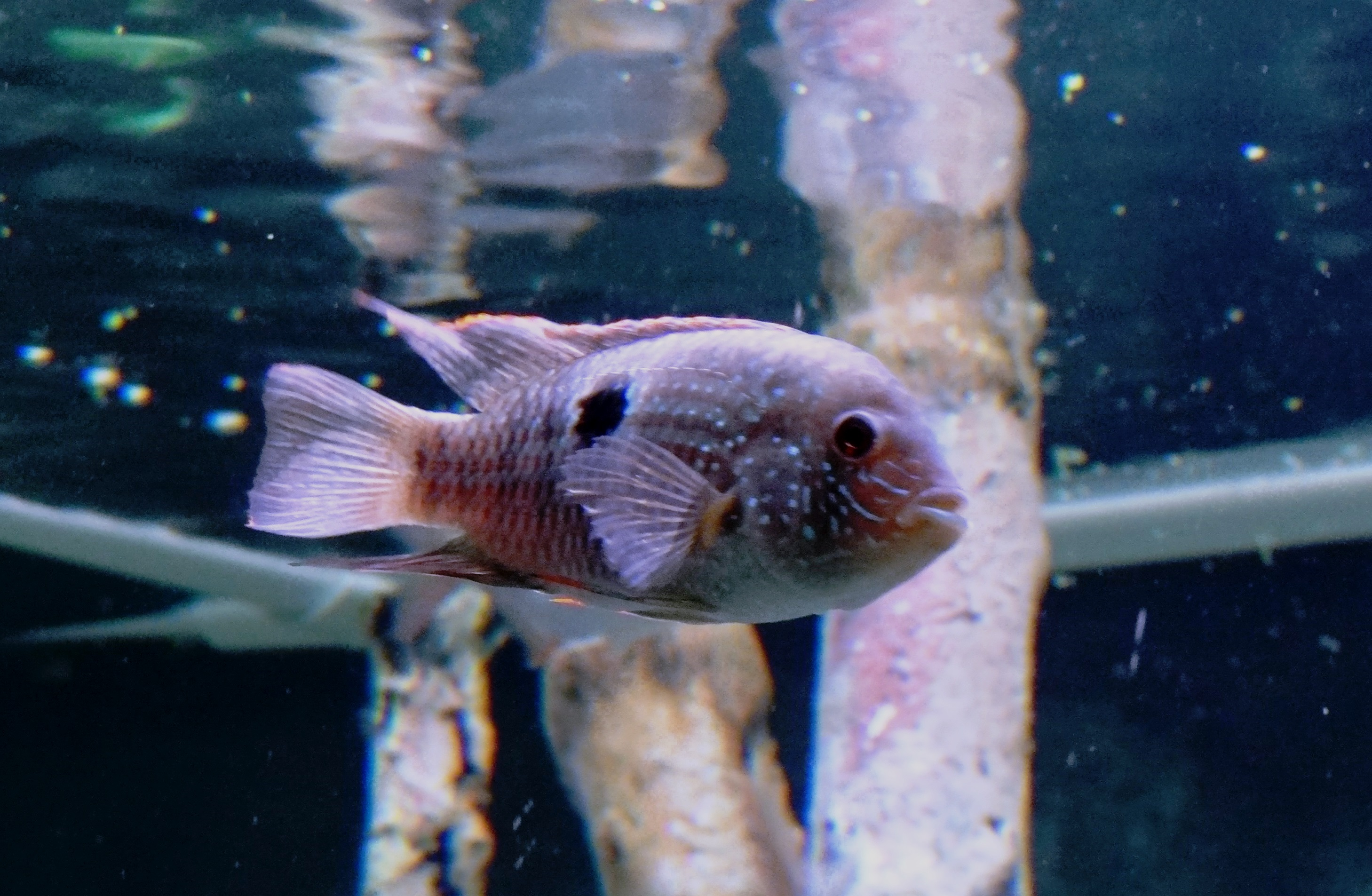 Tetra diente de gamo (Exodon paradoxus) en el acuario del Zoológico de Cali, Colombia